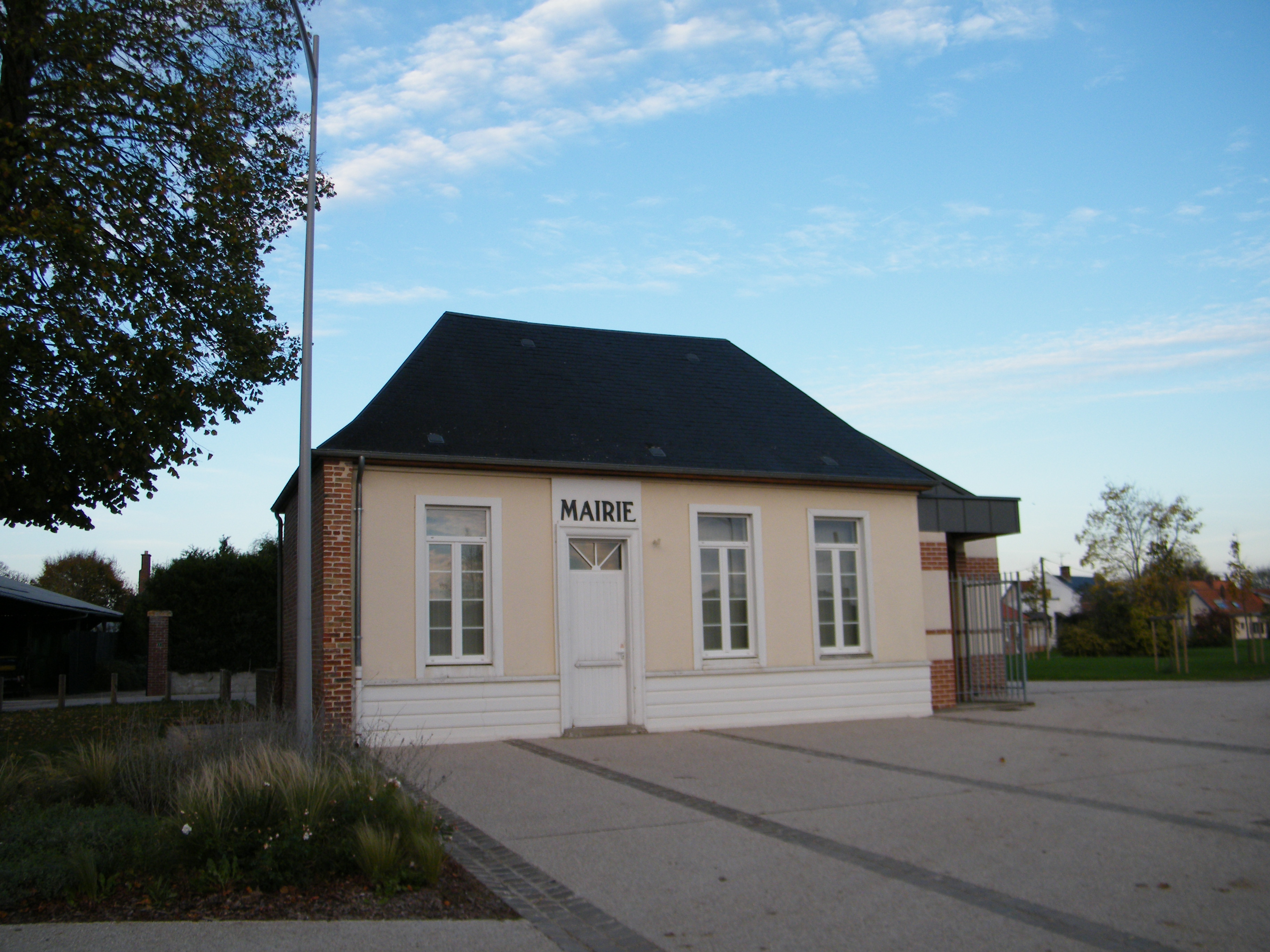 Salle communale.